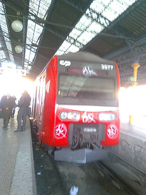 Frente da automotora UQE Comboios de Portugal 3577, em Alcântara-Terra (libré vermelha — introd. 2012).